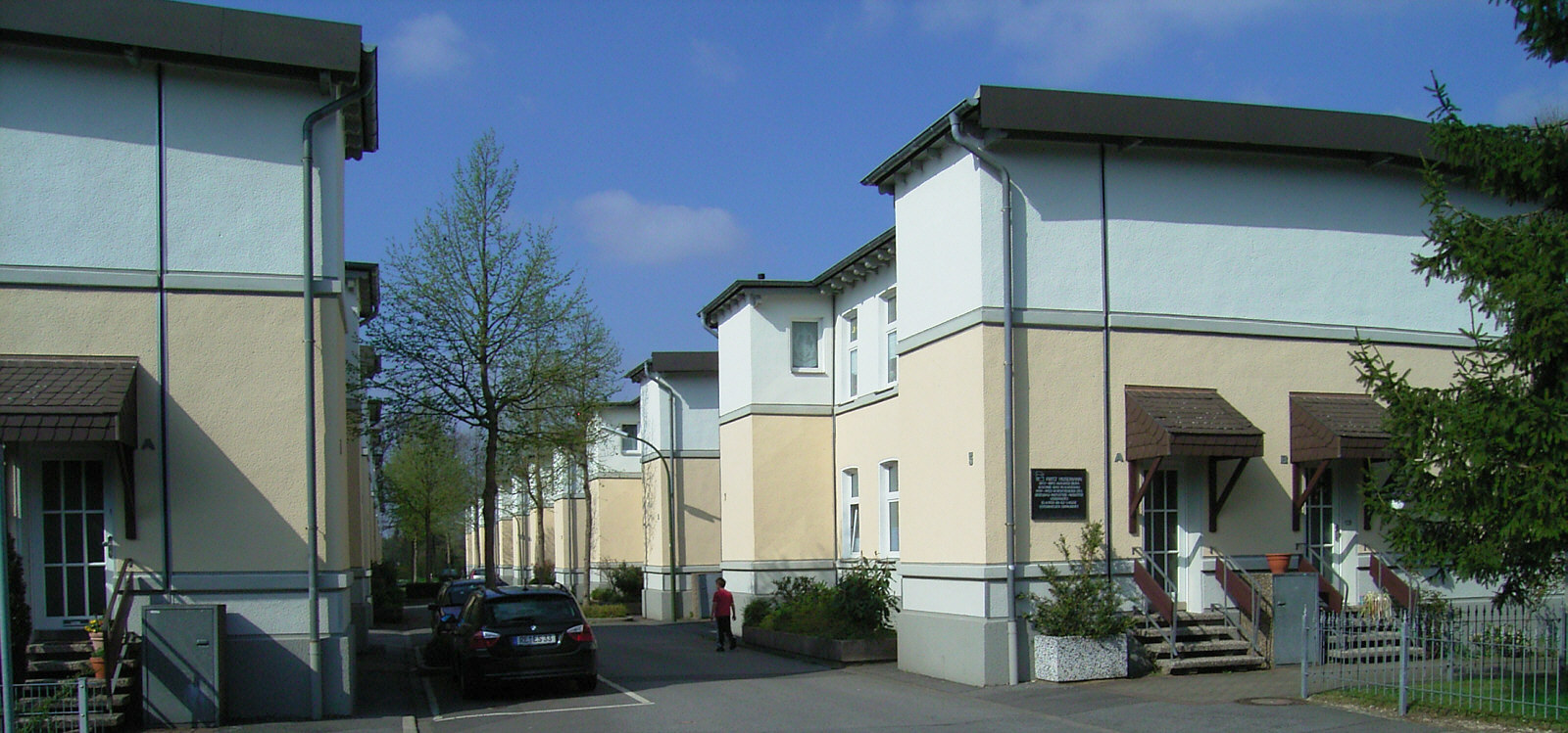 Bildbeschreibung: Kaiserau, ehemalige Zechensiedlung "Sektion 8", Bauzustand 2006. Die jüngste und letzte verbliebene Sektion, trotz starker Sanierungsmaßnahmen denkmalgeschütztes Ensemble Quelle: Eigenes Foto Fotograf/Zeichner: Smial Datum: 22.04.2006